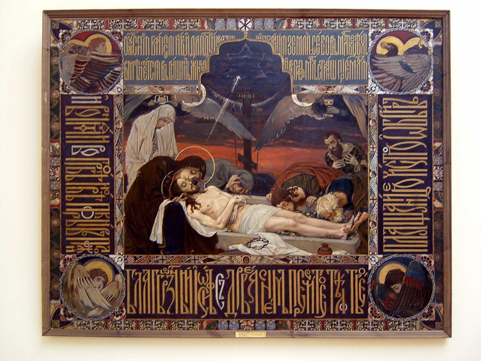 Mise_au_tombeau_du_Christ-Vasnetsov